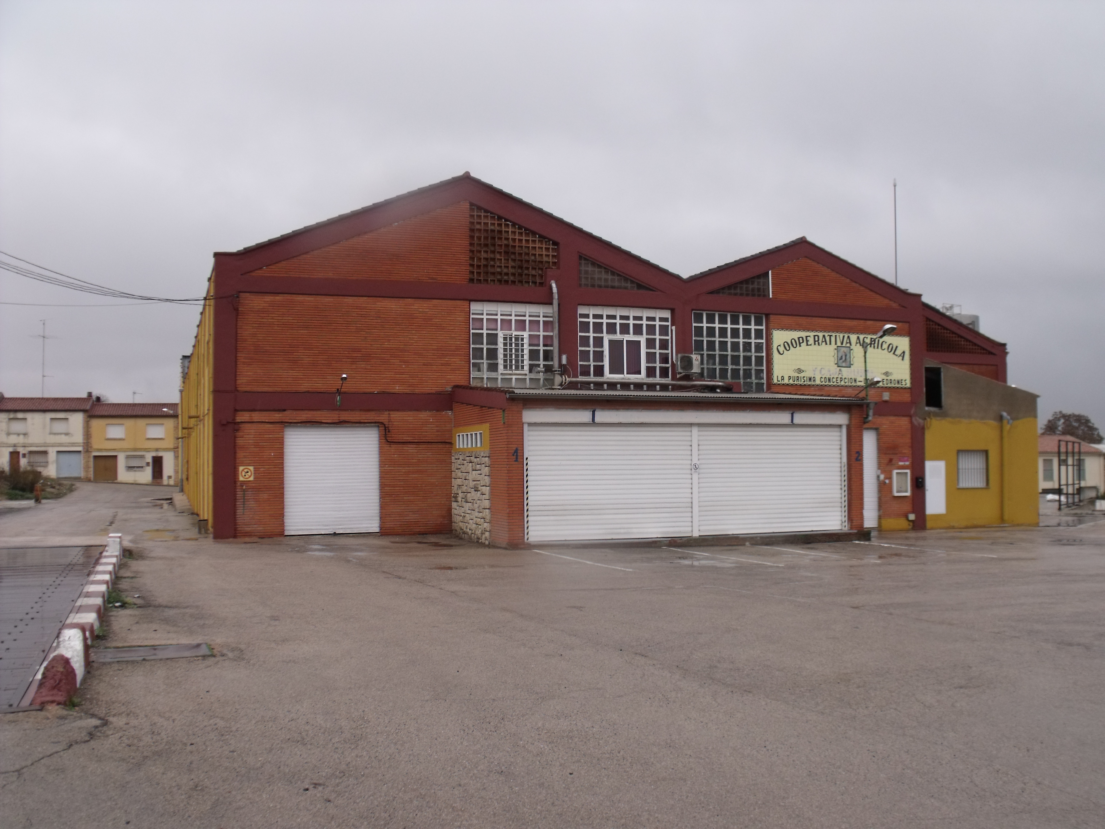 Fachada principal de la Cooperativa agrícola la Purísima Concepción. Los Pedrones.